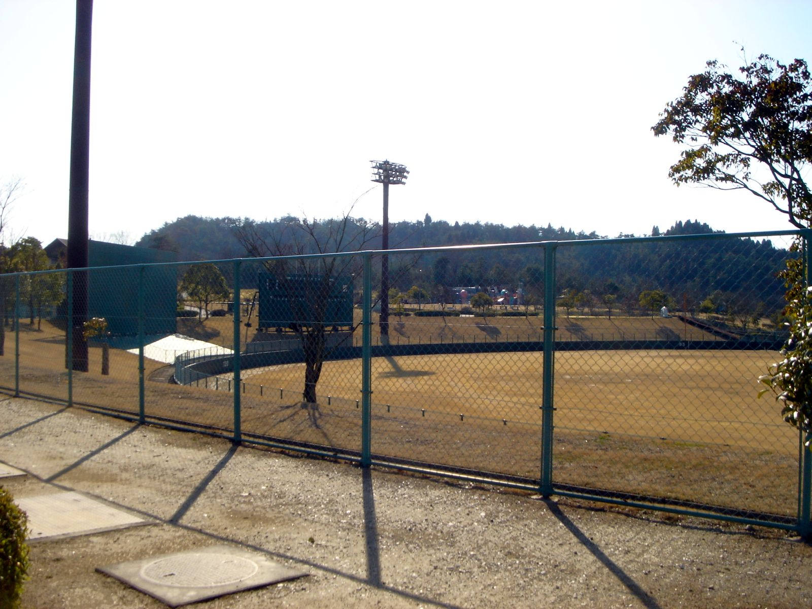 Toki City General Park（土岐市総合公園・野球場）,Toki,Gifu,Japan(岐阜県土岐市)で撮影。